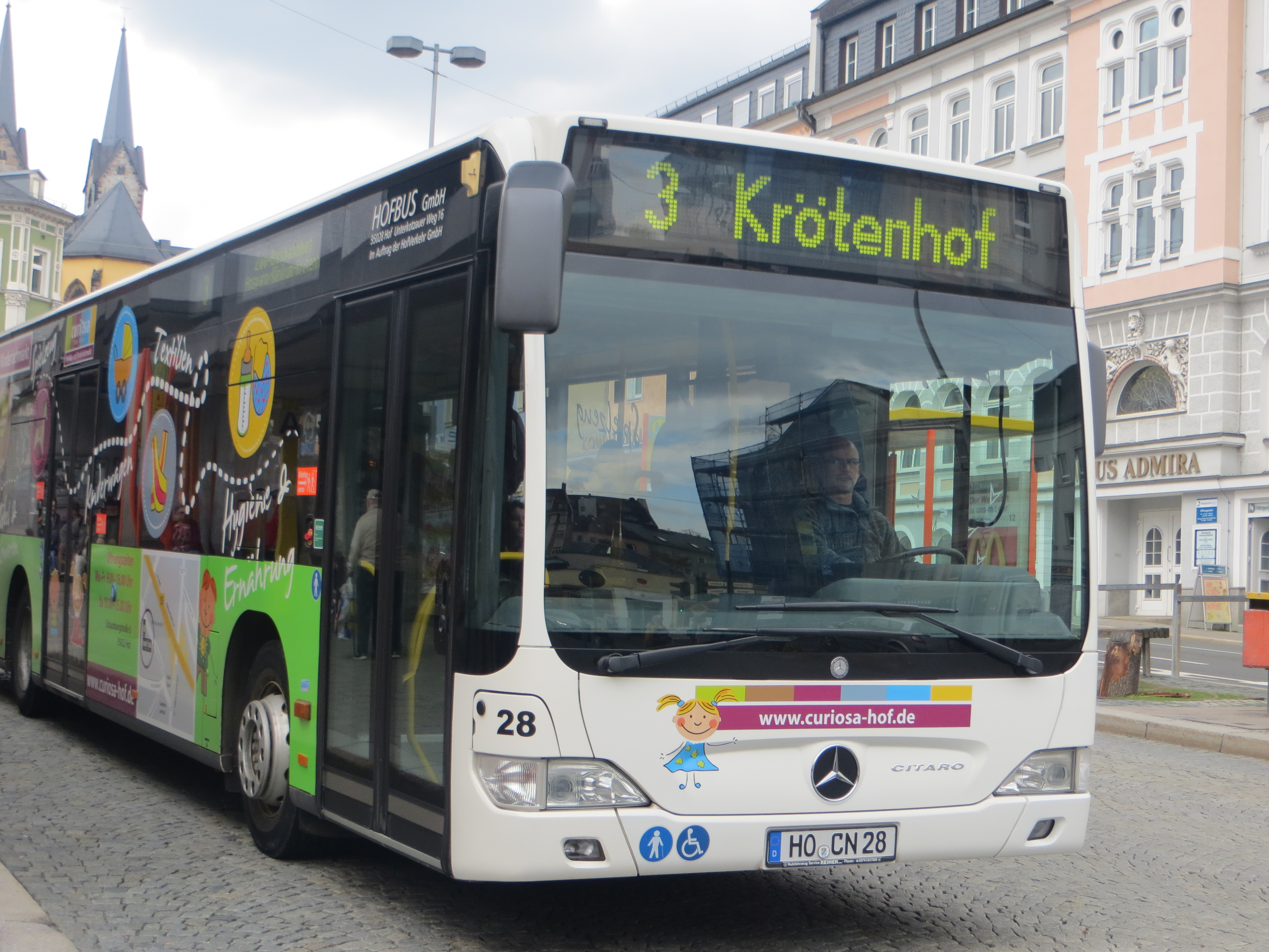 Linie 3 nach Krötenhof abfahrtsbereit am Busbahnhof